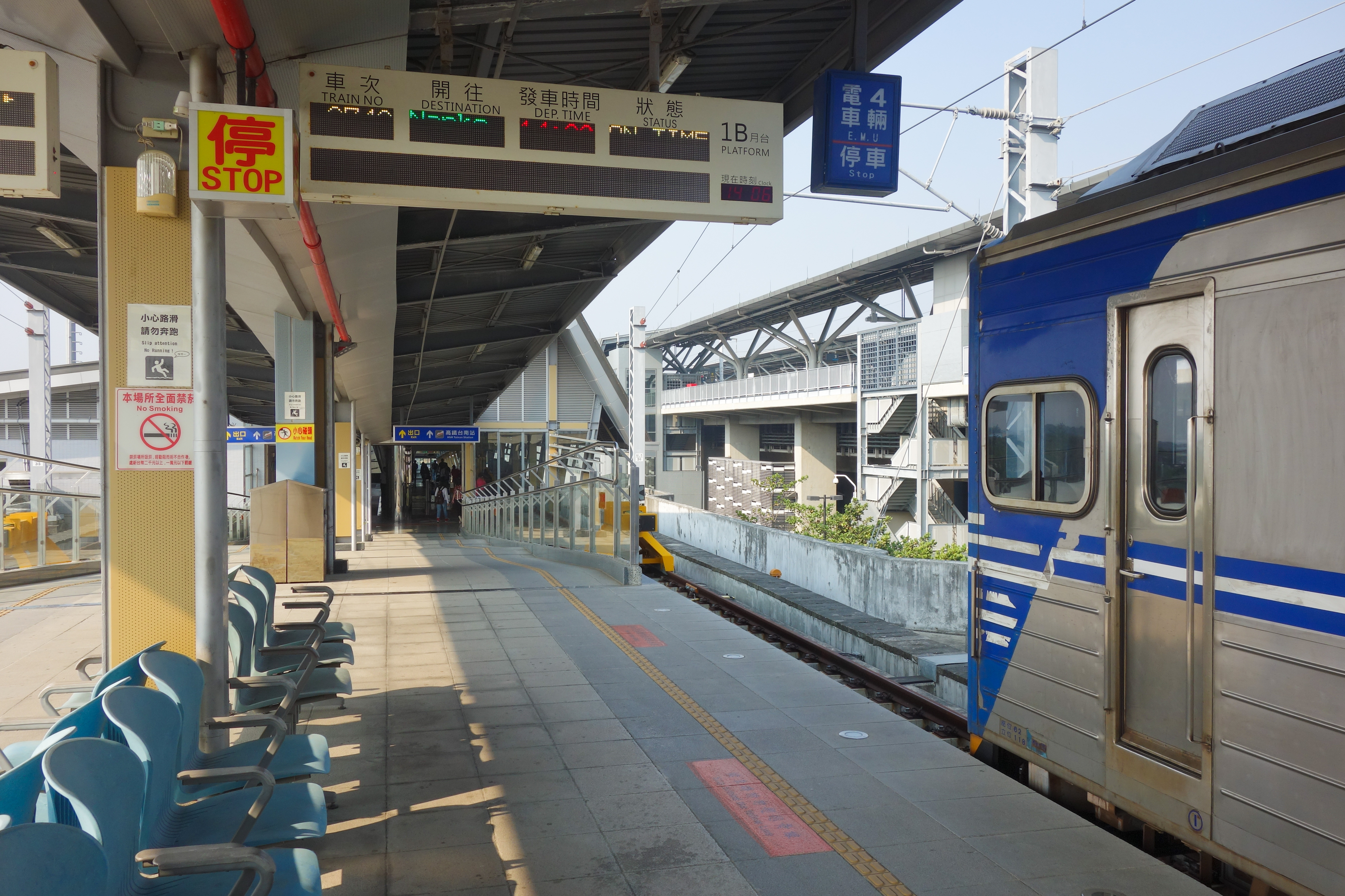 台鉄沙崙駅ホーム（右奥が高鉄台南駅ホーム）